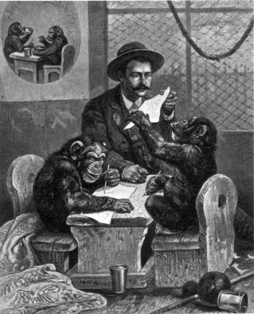 Adolf Nill, Besitzer von Nills Tiergarten in Stuttgart, beim Malunterricht mit seinen zwei Schimpansen Cora und Joko, vor 1907.